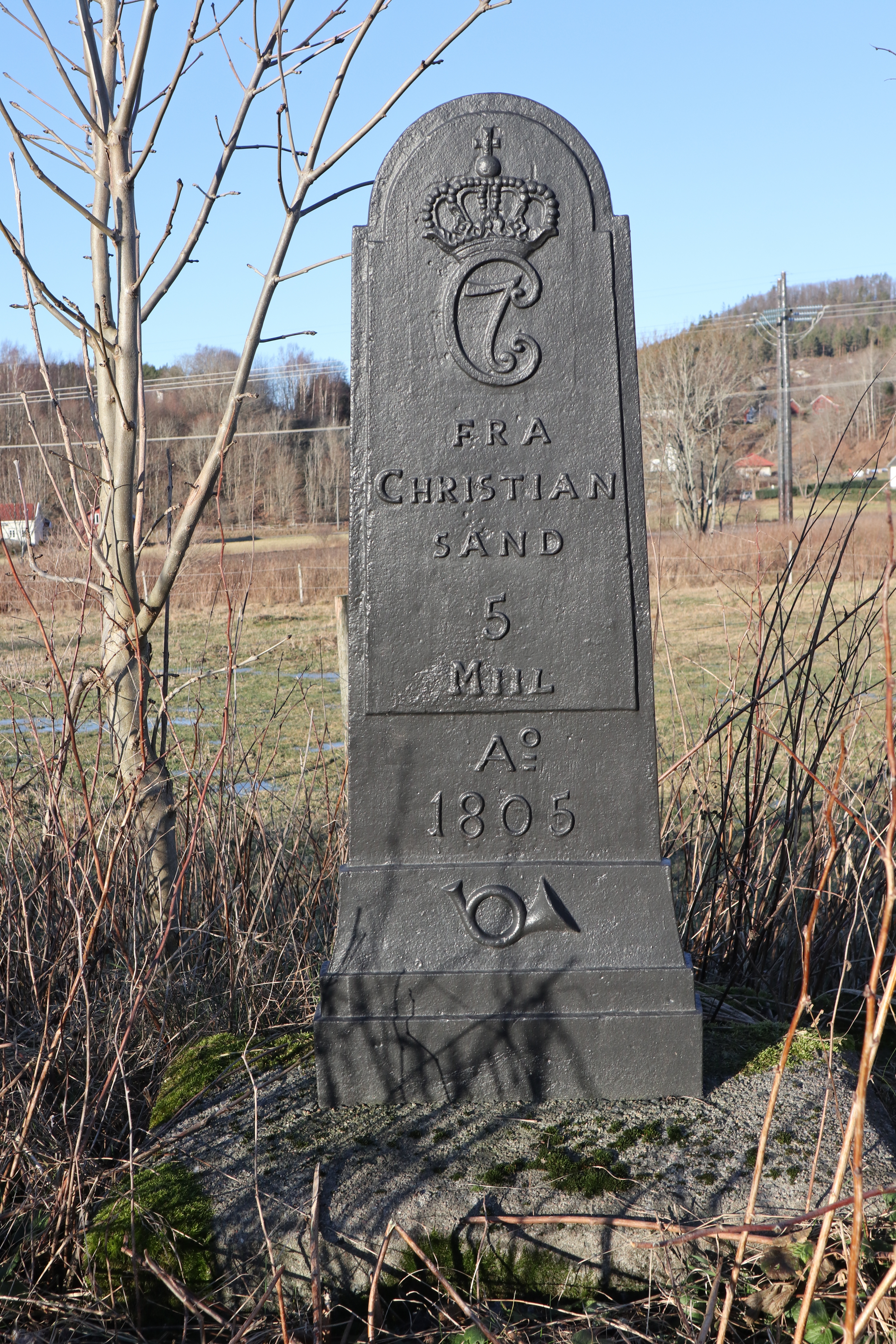 Milepæl med kong Christian VIIs monogram. Anno 1805.